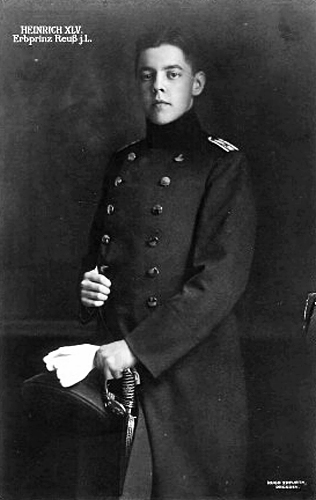 Heinrich XLV. von Reuß jüngerer Linie